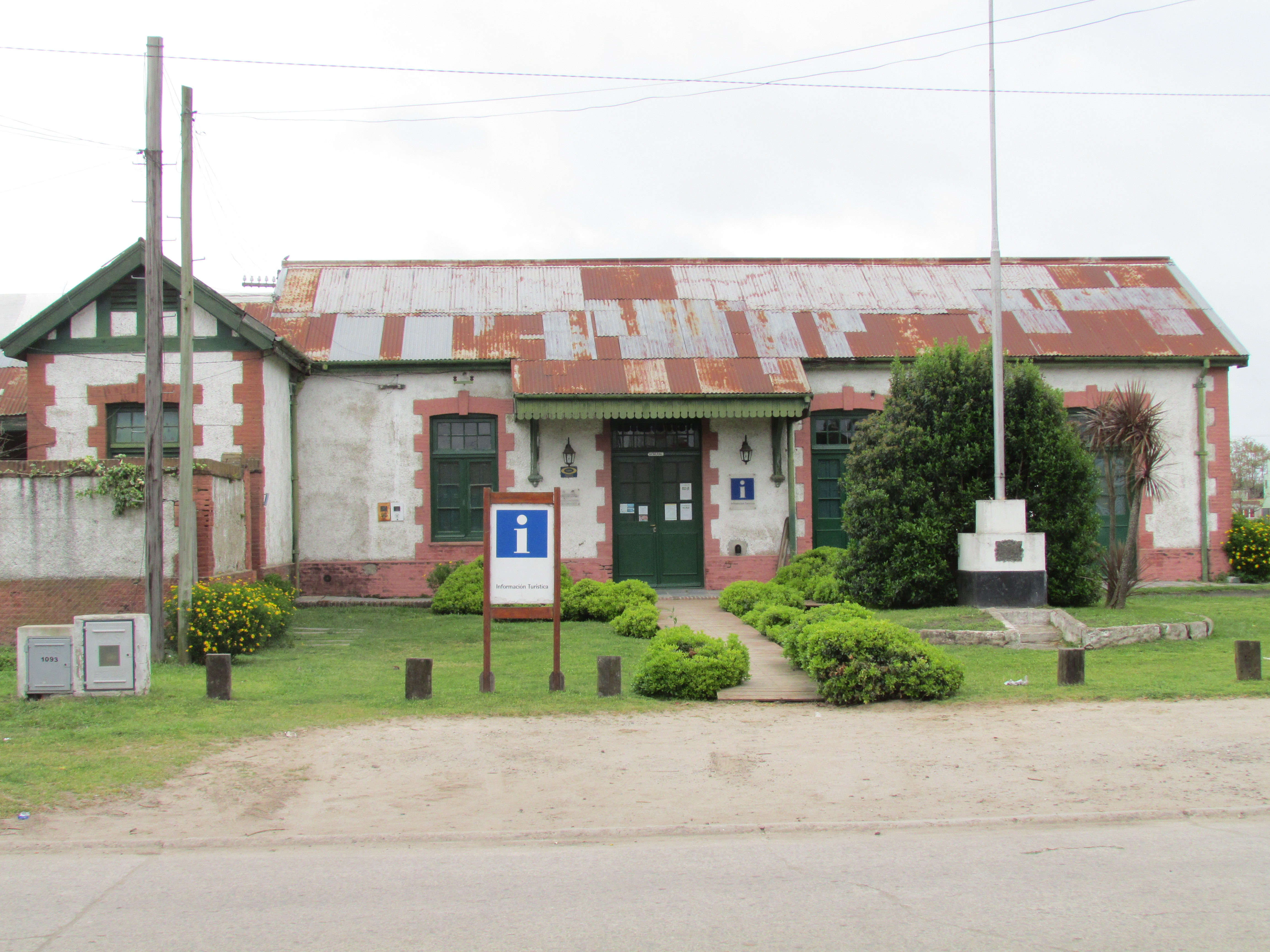 Frente del edificio de la estación General Madariaga del Ferrocarril General Roca, en la ciudad del mismo nombre, provincia de Buenos Aires, Argentina.